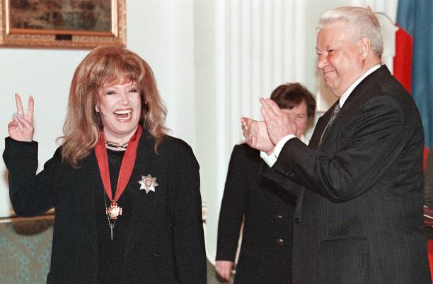 МОСКВА, КРЕМЛЬ. Церемония вручения государственных наград. Орден "За заслуги перед Отечеством" II степени вручен певице Алле Пугачёвой